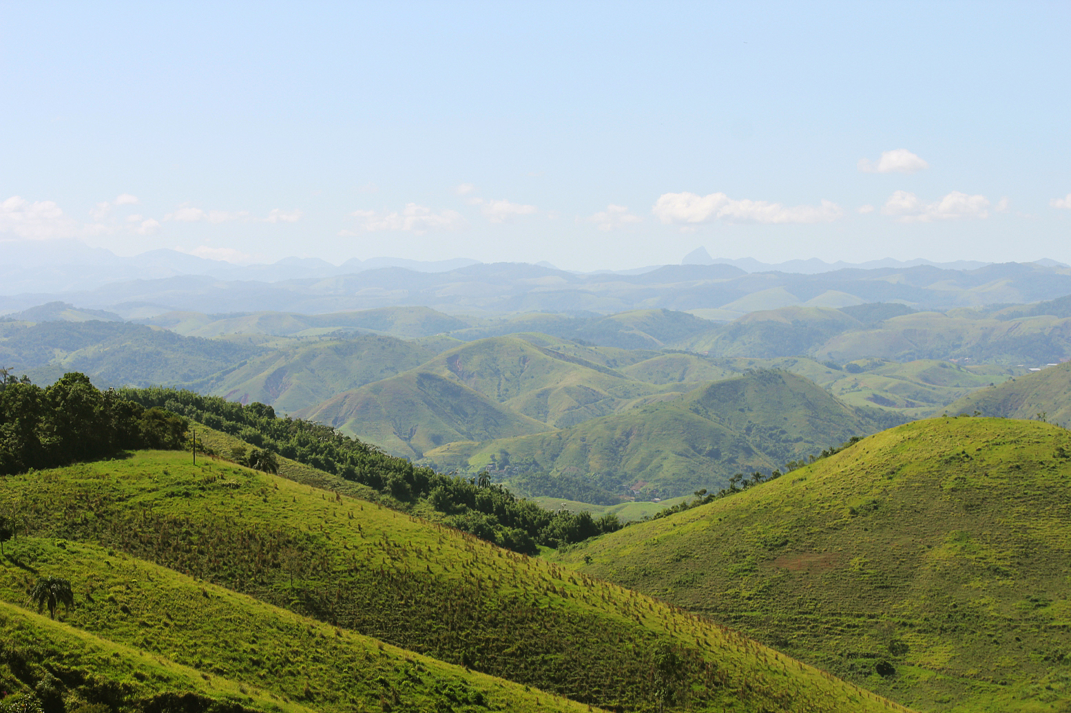 Vista do Vale do Paraíba fluminense a partir do Parque Estudual Serra da Concórdia